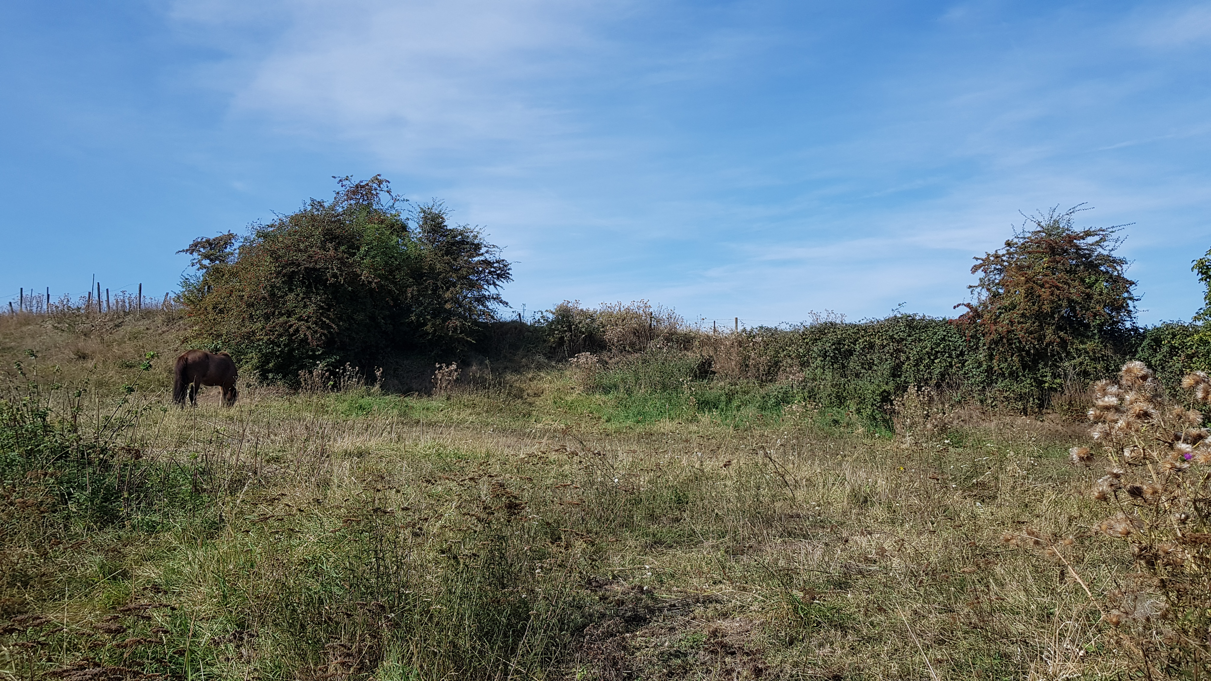 Groeve Theunissen I, Maastricht, Nederland